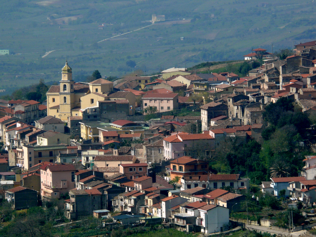 Panoramica di San Lorenzo Maggiore, Benevento, Italy